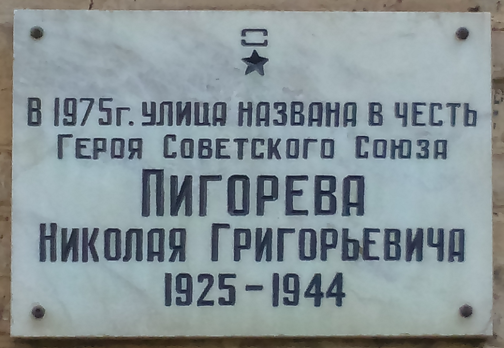 Мемориальная доска на ул. Пигорева в г. Курске